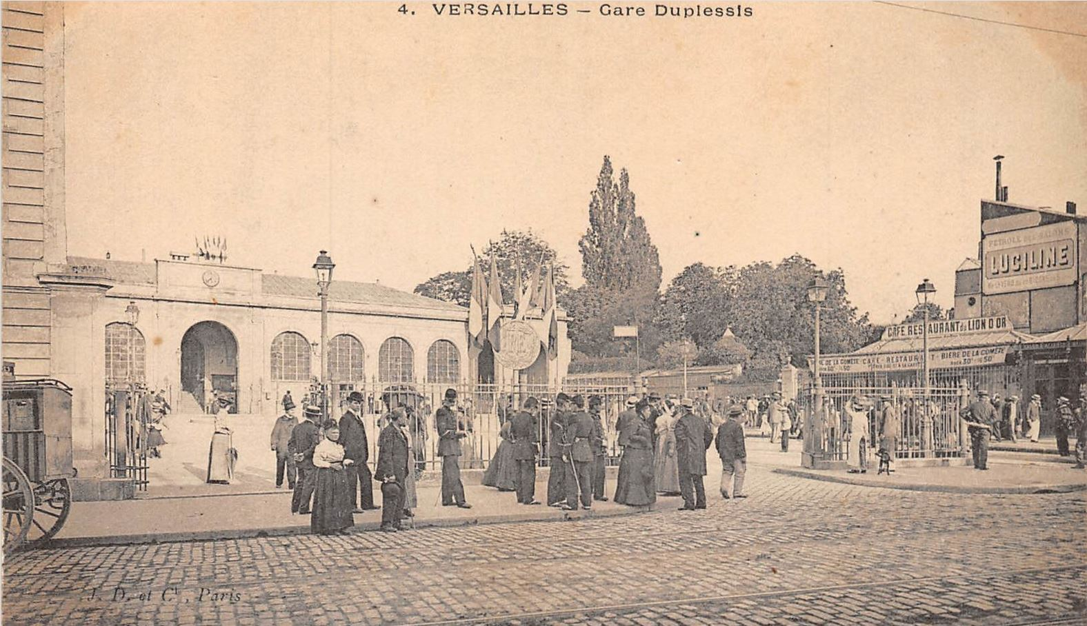 Carte postale avec en photo la gare de Versailles-Rive-Droite au début du XXe siècle.